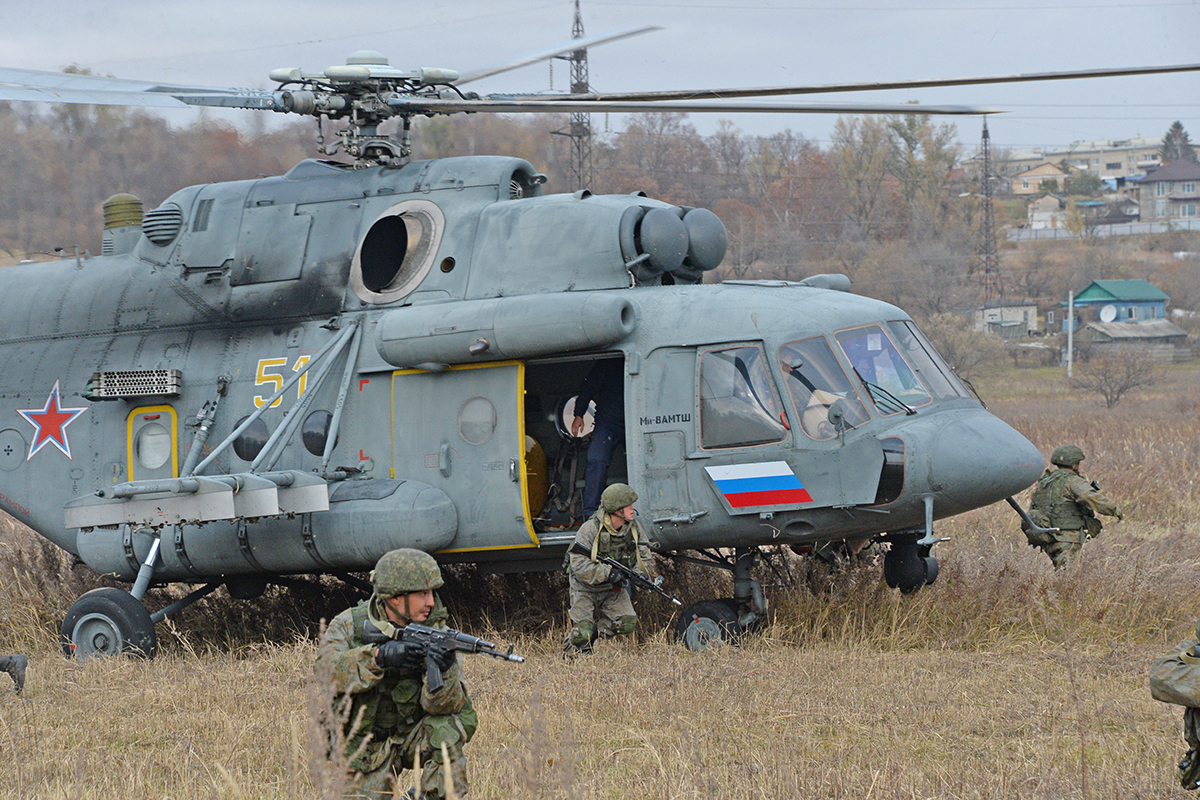 Завершающая фаза тактического учения с соединением ВДВ в Уссурийске.